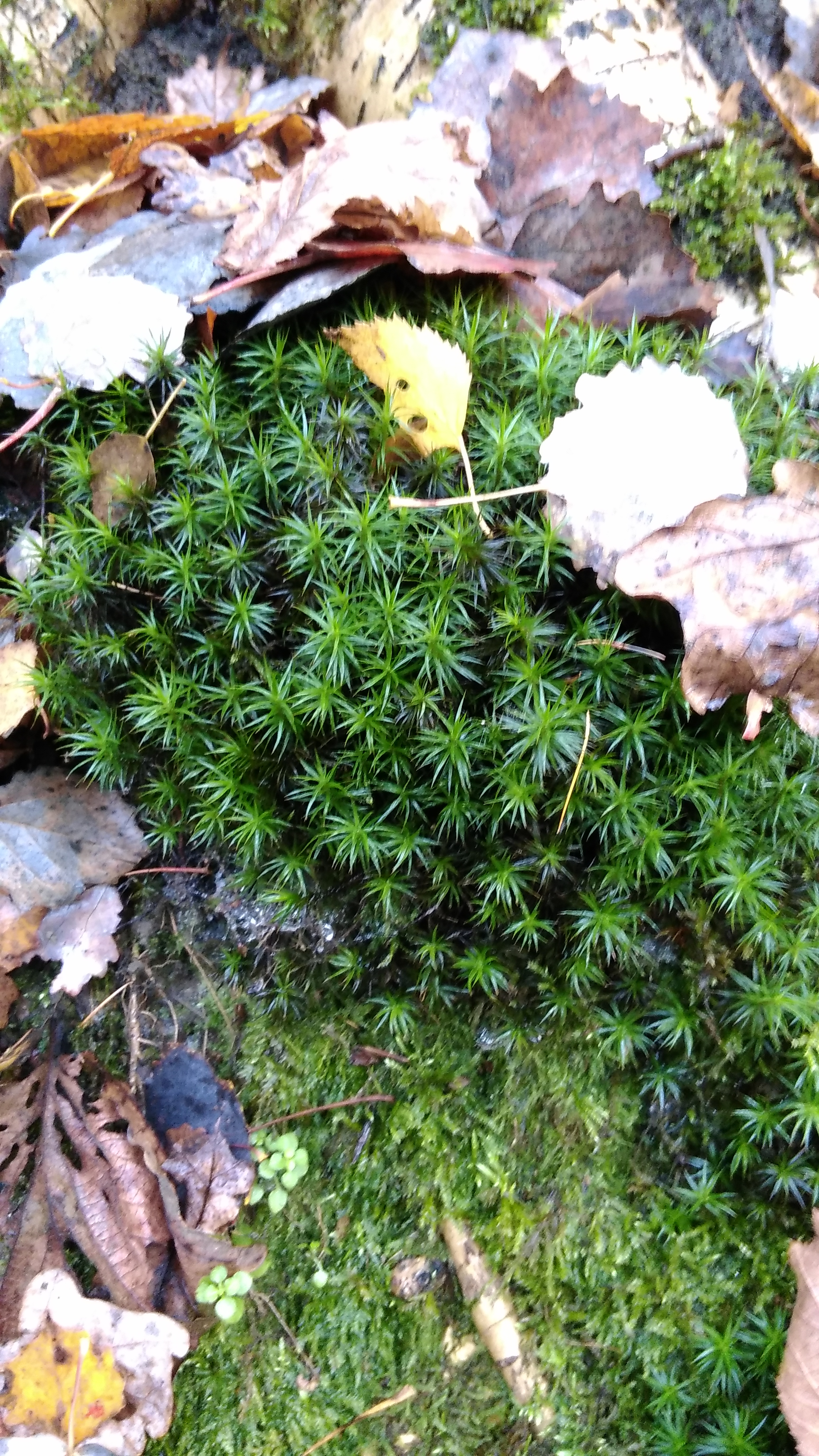 Rašeliník v lese